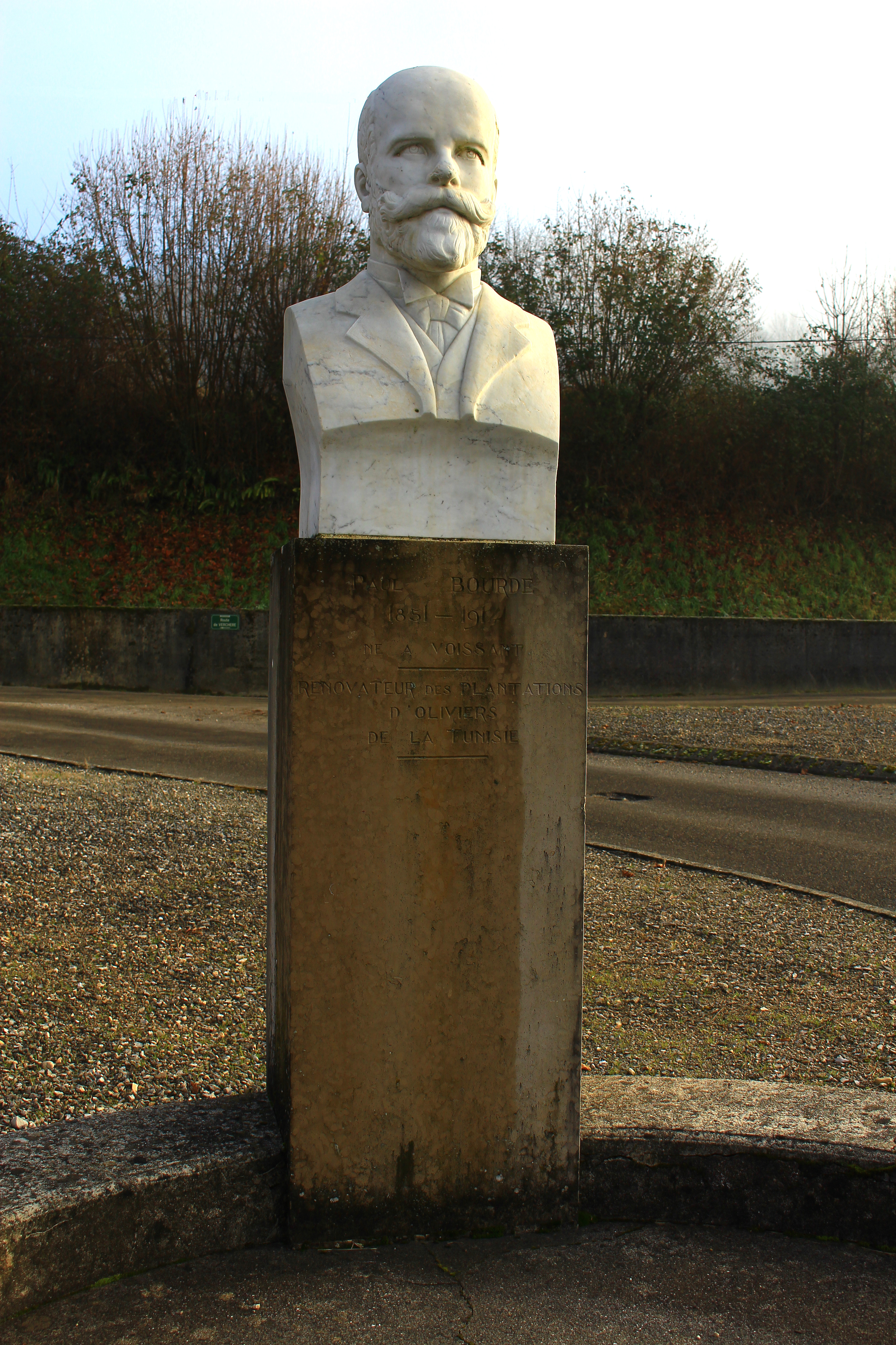 Buste de Paul Bourde (journaliste) à Voissant (Isère). Photo prise en décembre 2016.